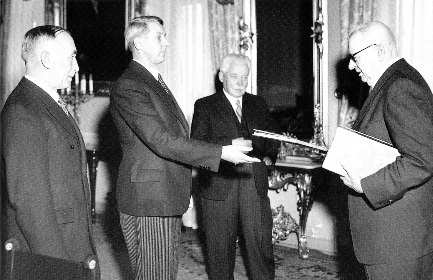 Historioitsijat Arvi Korhonen ja Eino Jutikkala sekä kustantaja Jalmari Jäntti luovuttamassa Historian käsikirjaa presidentti J. K. Paasikivelle.